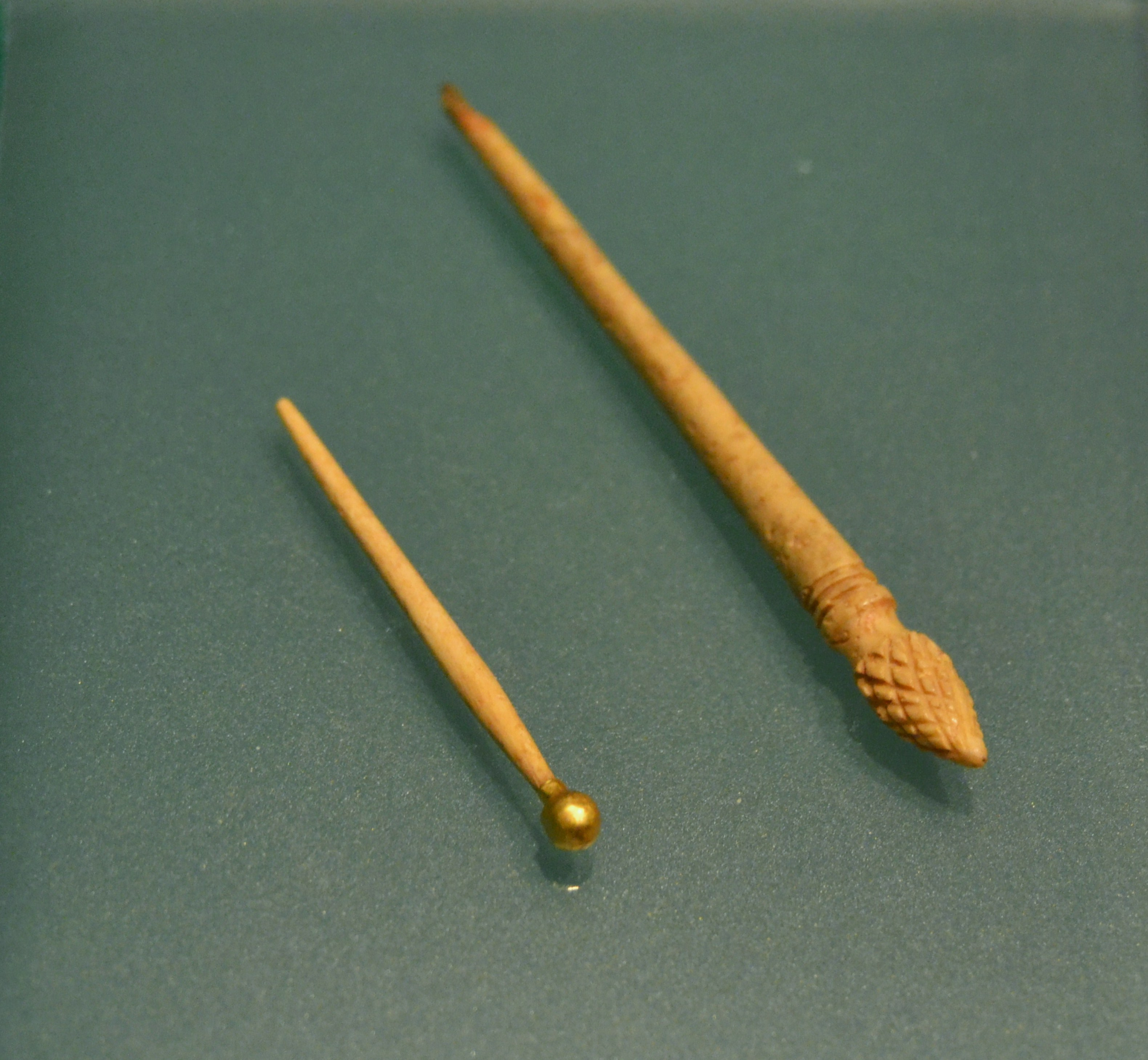 Agulles per al cabell, acus crinalis, d'os polit amb cap esfèric folrat d'or i amb cap de pinya, segles I - II dC, trobades a la vil·la de Cornelius, l'Ènova.